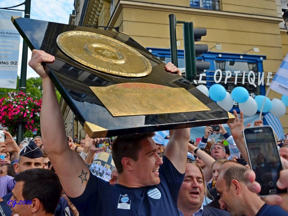 Présentation du Brennus par le Racing 92 aux supporters (Le Plessis-Robinson)